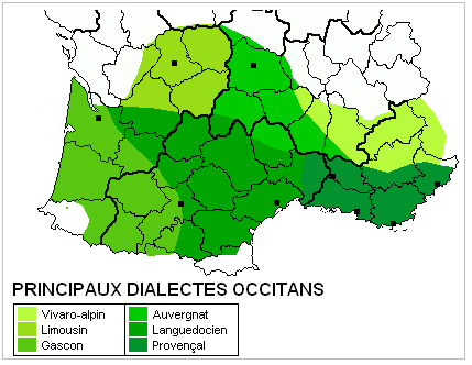 Carte de l'occitan